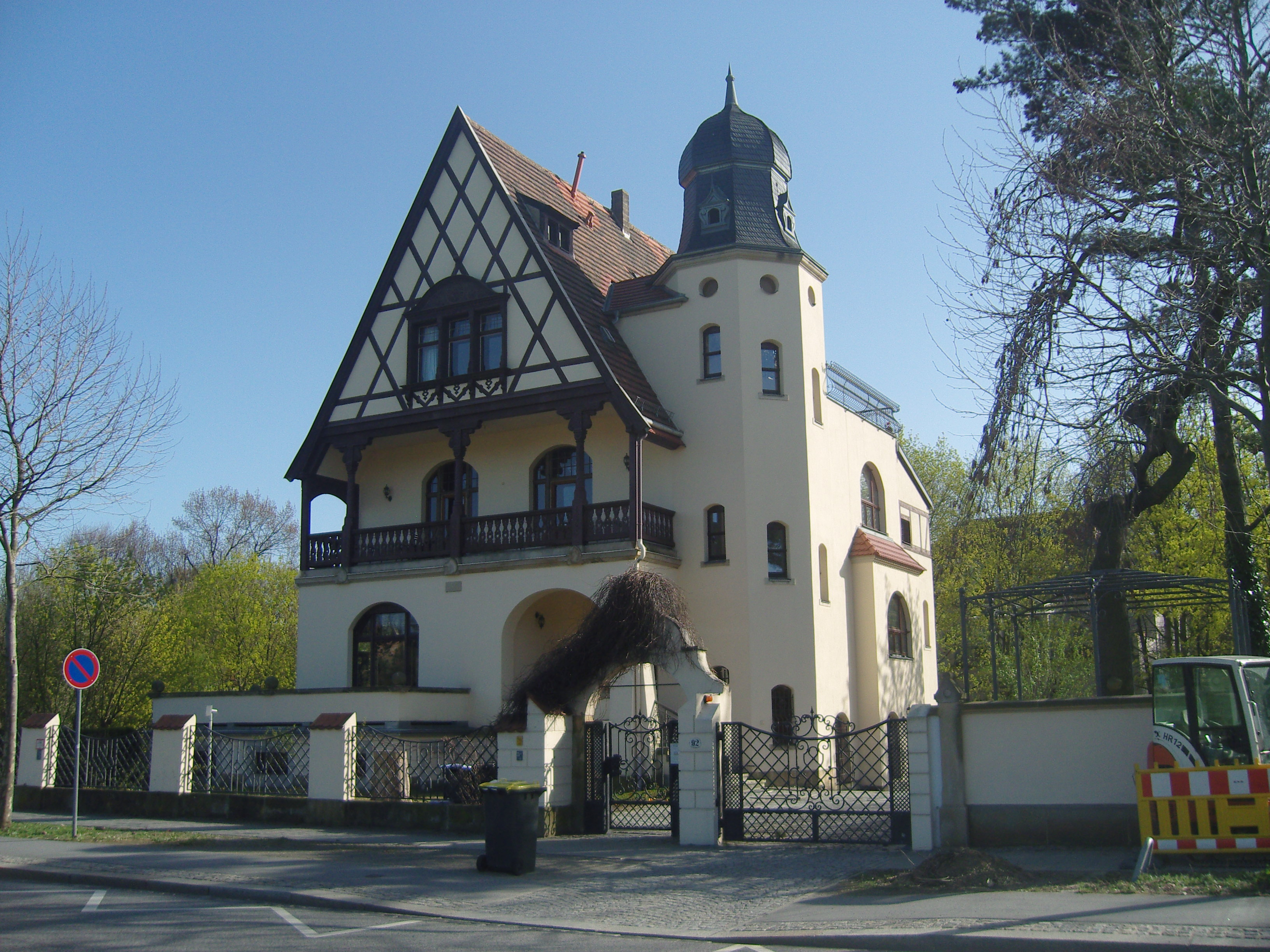 Denkmalgeschütztes Gebäude am Käthe-Kollwitz-Ufer 92 in Dresden